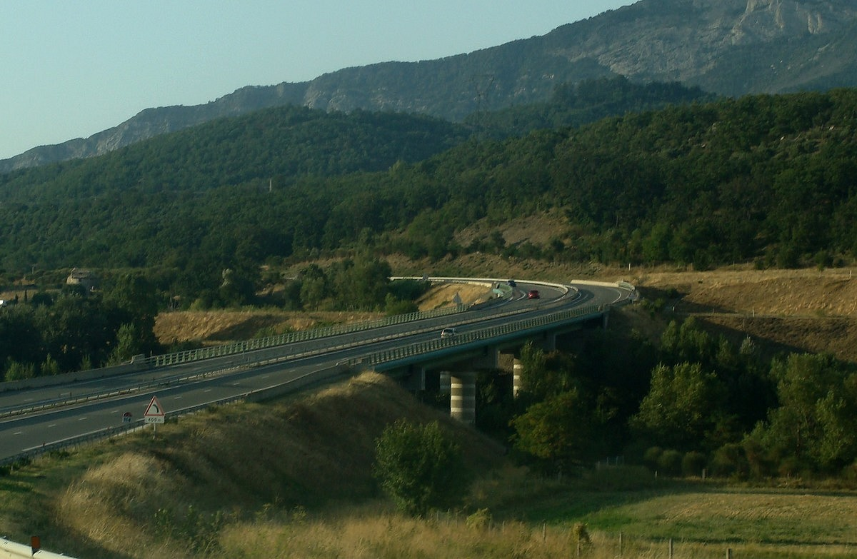 Franchissement de la Durance par l'A 51 au sud de Sisteron. Le viaduc est rectiligne, mais entre deux courbes prononcées (vitesse limitée à 110 km/h).